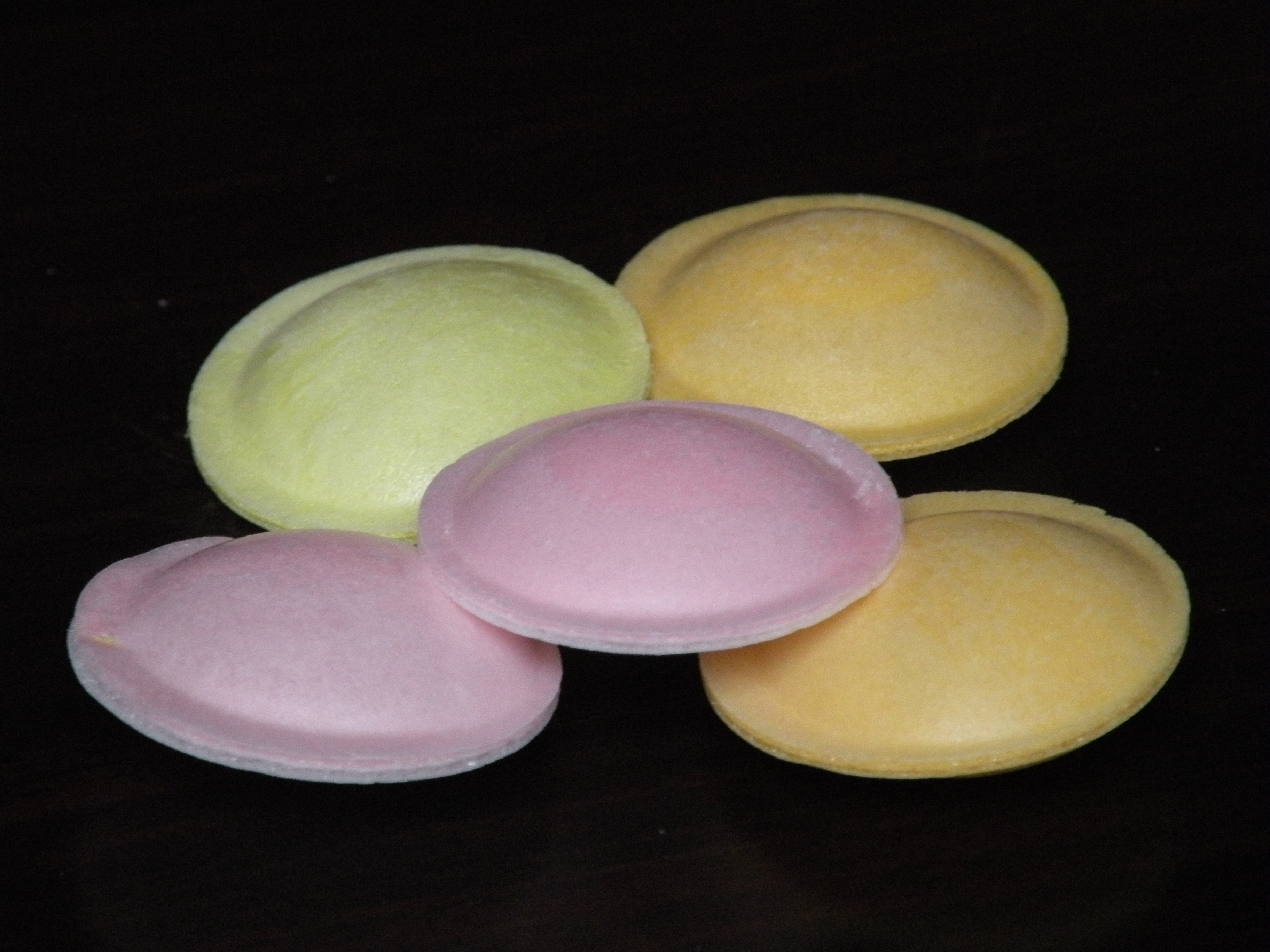 bonbon soucoupe fait avecdu papier azyme